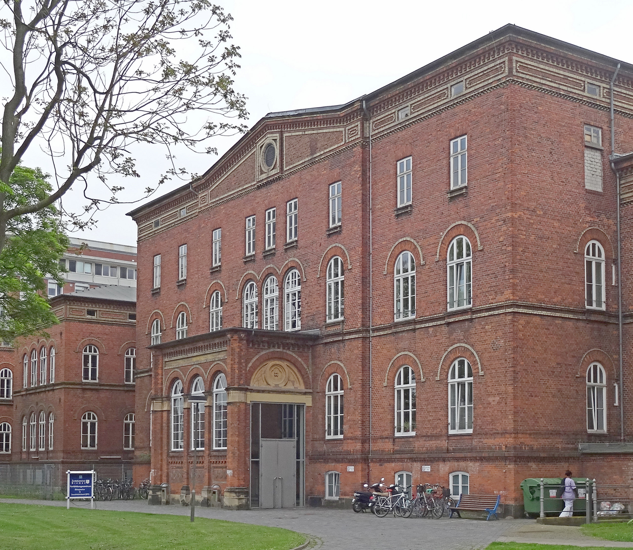 Zentralkrankenhaus St.-Jürgen-Straße in Bremen, St.-Jürgen-Straße 1. Gebäude von 1847–1851, Architekt: Alexander Schröder (1806–1877)Das abgebildete Objekt ist ein geschütztes Kulturdenkmal in der Freien Hansestadt Bremen, mit der Nr. 1155 beim Landesamt für Denkmalpflege registriert.